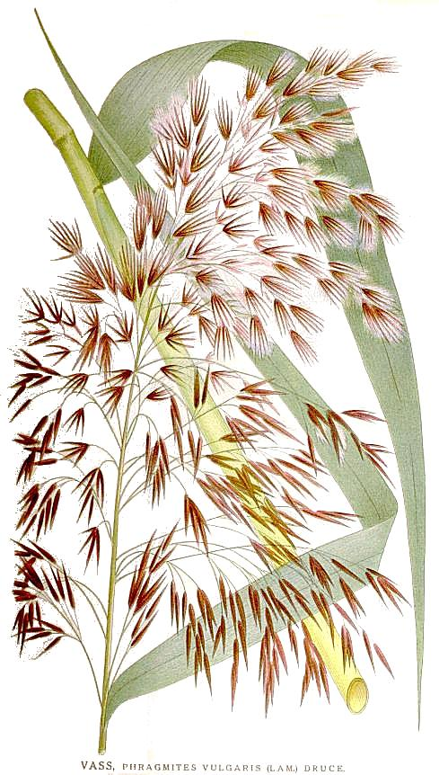 Phragmites australis (Cav.) Trin. ex Steud., syn. Phragmites vulgaris (Lam.) Crép. Original Description "Vass", Phragmites vulgaris (Lam.) Druce.